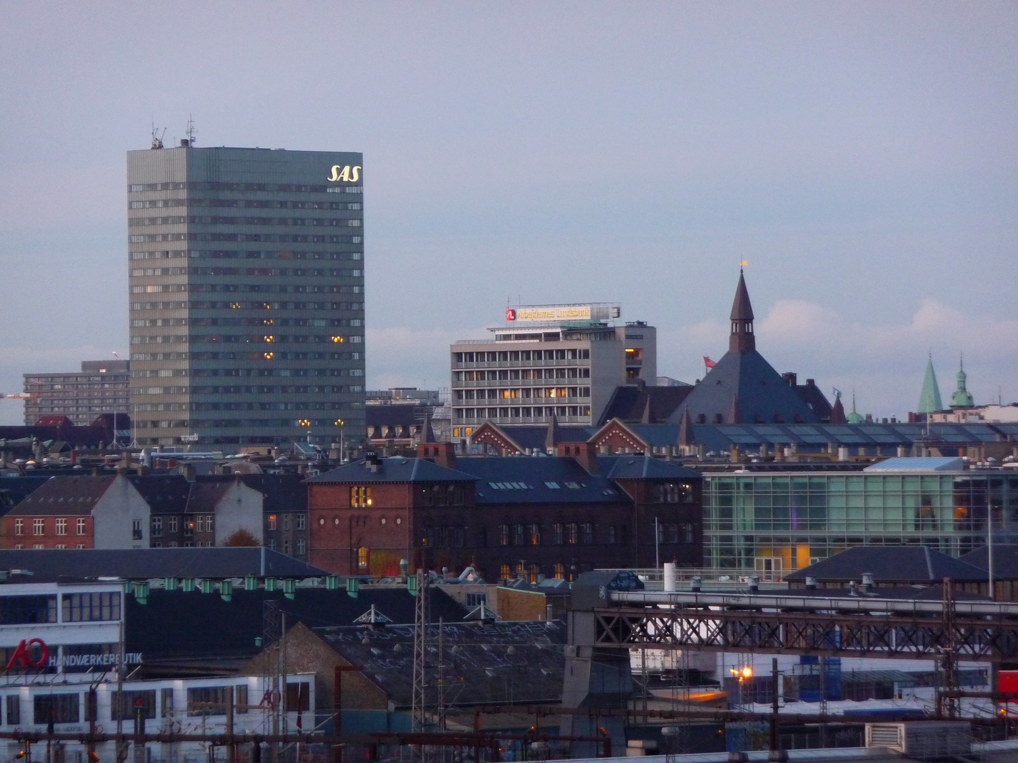 Blick vom Fisketorvet Einkaufszentrum / View of the Fisketorvet Shopping Center Im Hintergrund sieht man das 1960 von Arne Jacobsen errichtet Radisson SAS Royal Hotel, das erste Hochhaus in Kopenhagen.